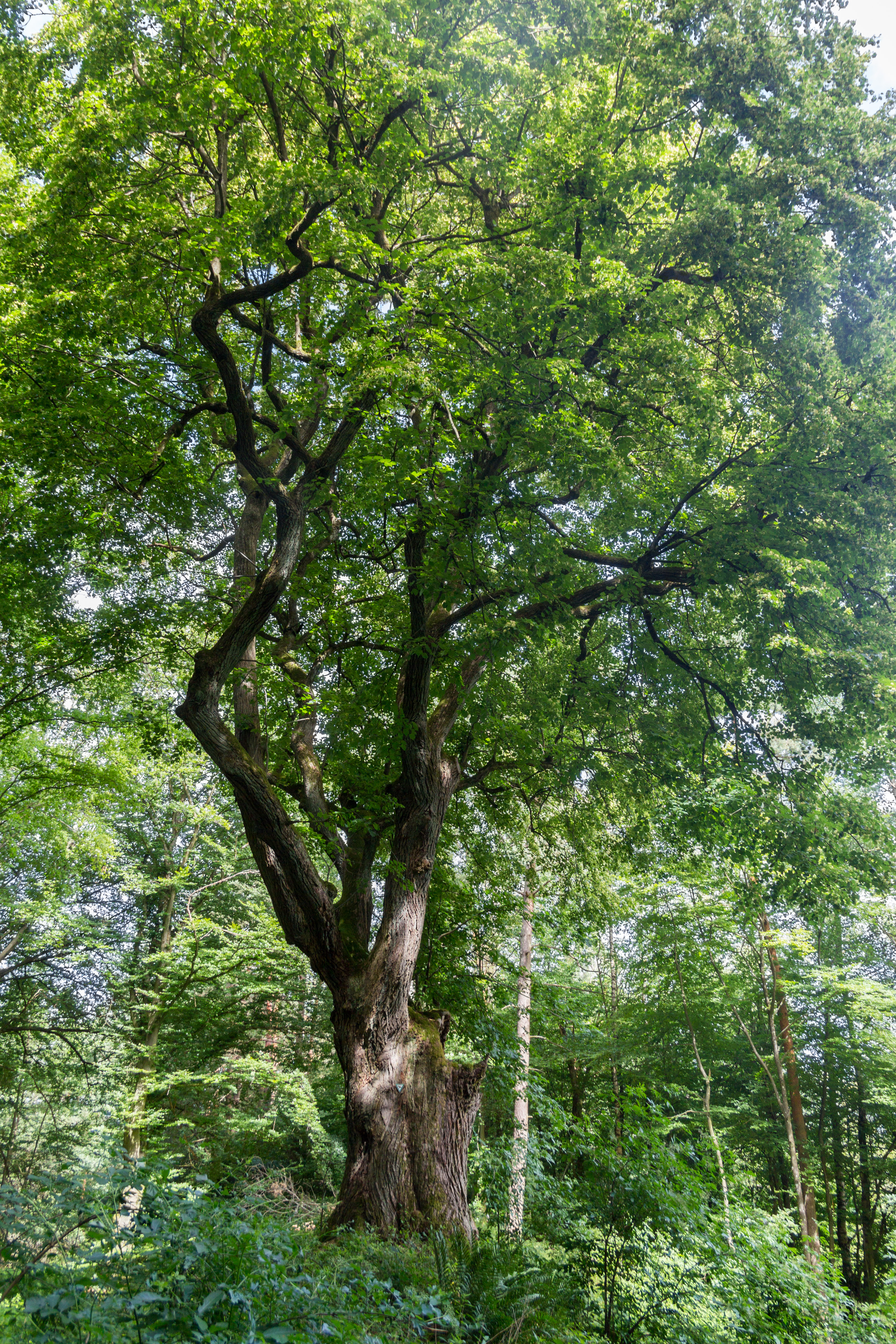 Gspannberger Linde, Naturdenmal